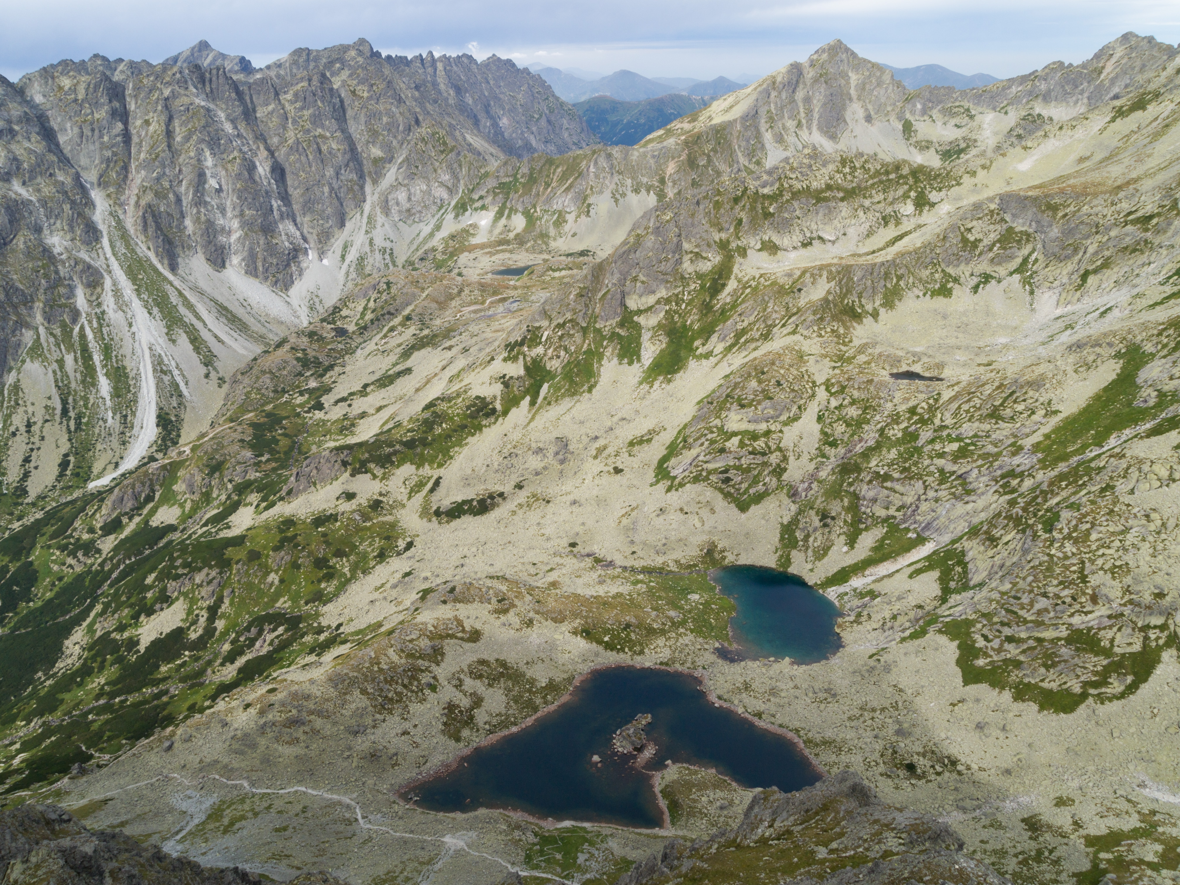 Żabie Stawy Mięguszowieckie, Krywań, Grań Hrubego i Koprowy Wierch z Kopy Popradzkiej